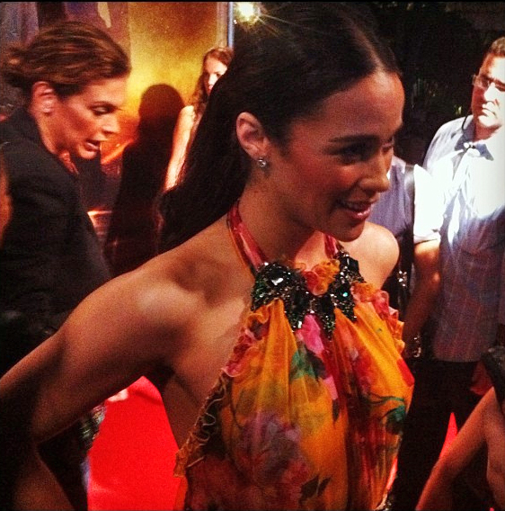 Paula Patton do Missão Impossível 2011